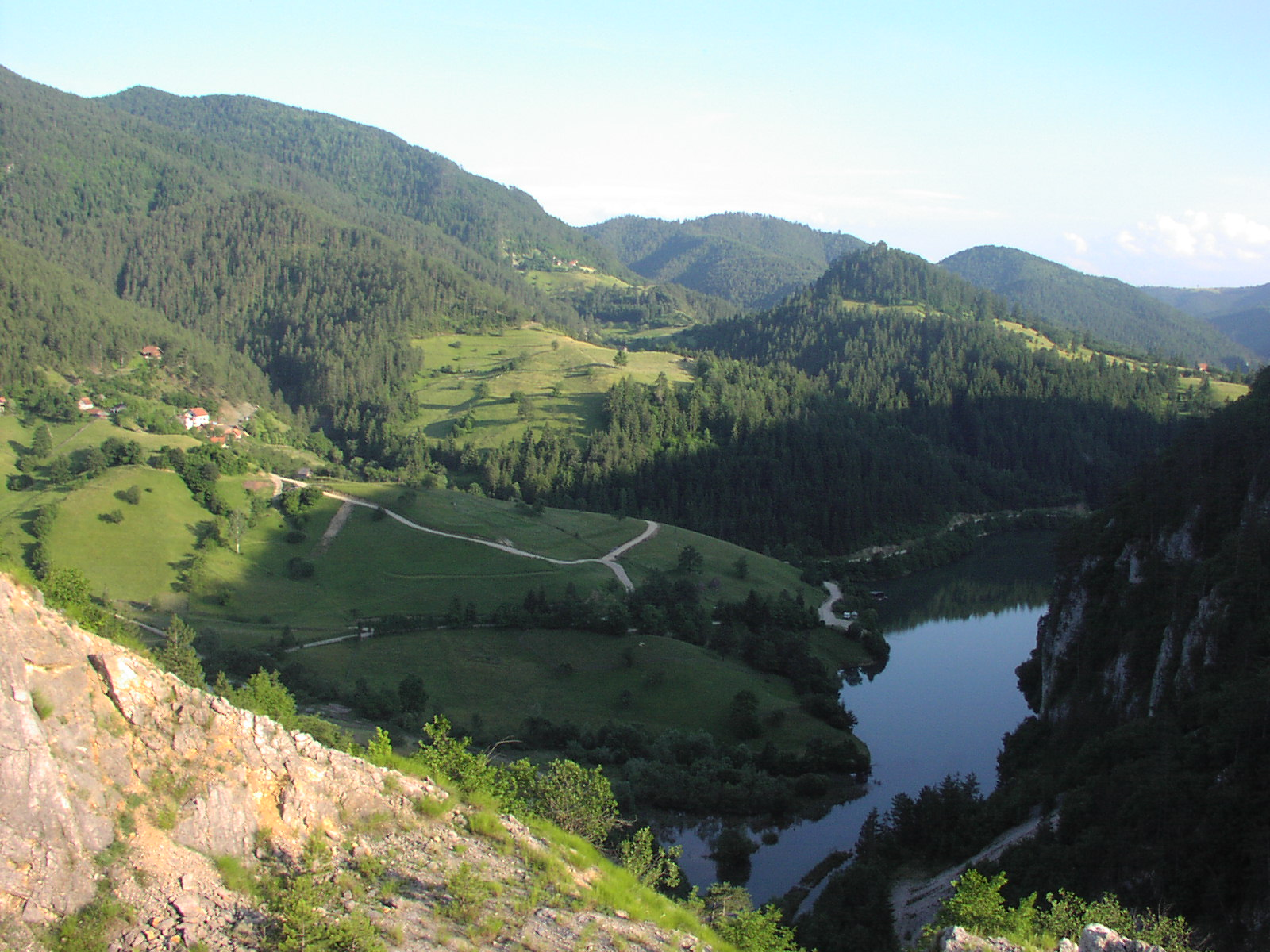 Tara - Jezero Perućac.jpg